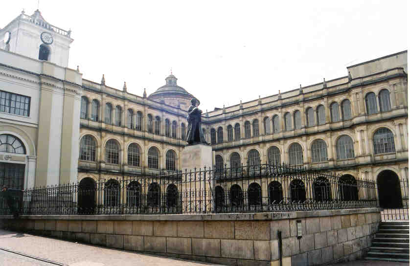 Foto del colegio